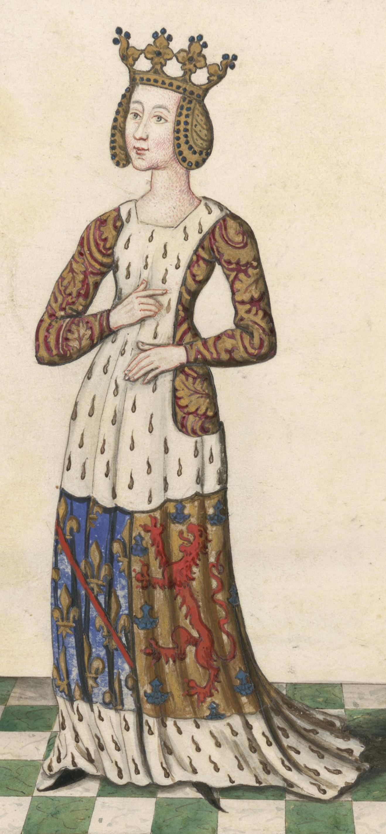 Béatrice de Bourgogne (1257-1310)